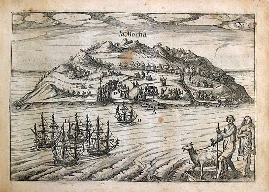 Imagen de la Isla Mocha, Chile, durante una incursión de una flota pirata holandesa en 1616, grabado del libro que narra las aventuras del corsario holandes Joris Van Spilberger